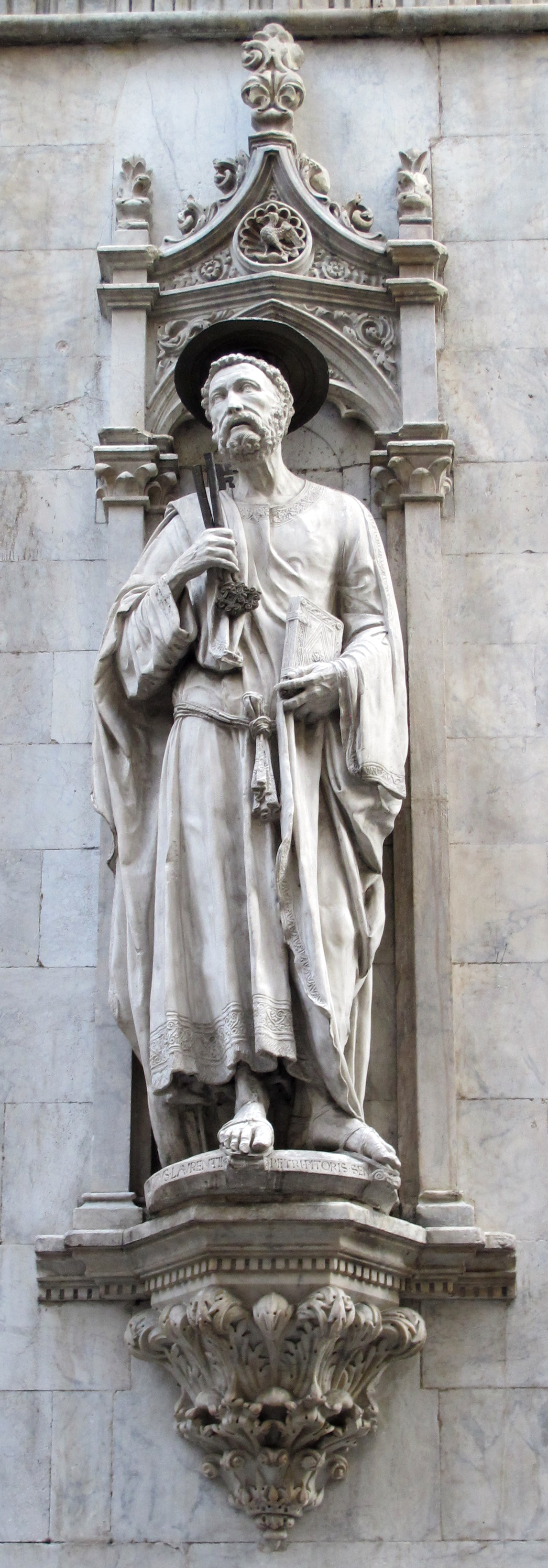 Siena